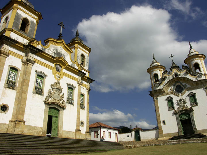 Zentrale Kirchen in Mariana mit der Igreja São Francisco de Assis